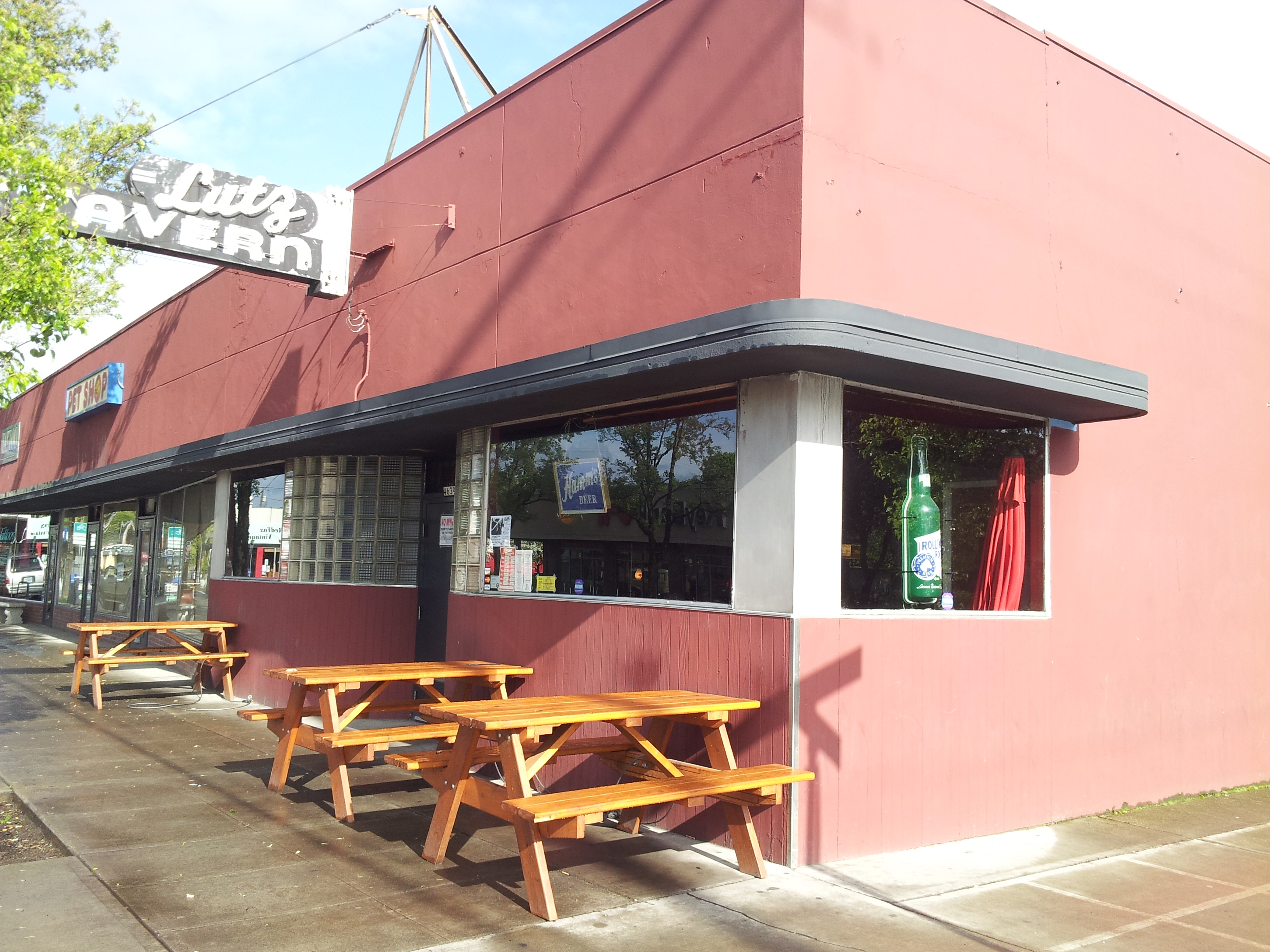 Lutz Tavern, Portland, OR (2014)